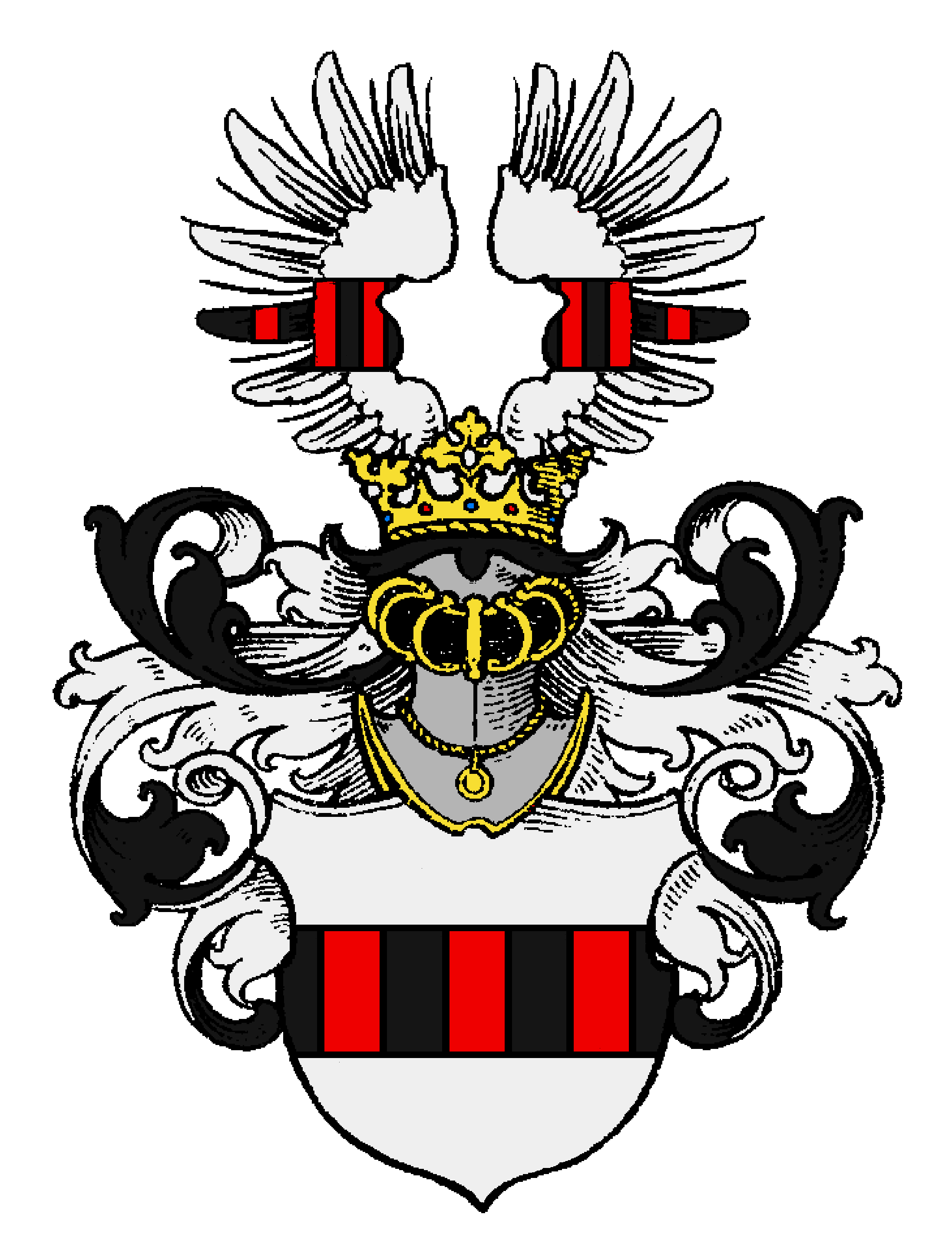 Stammwappen der Kärntner Grimming (Grüming) von Stahl (es bestehen Varianten)